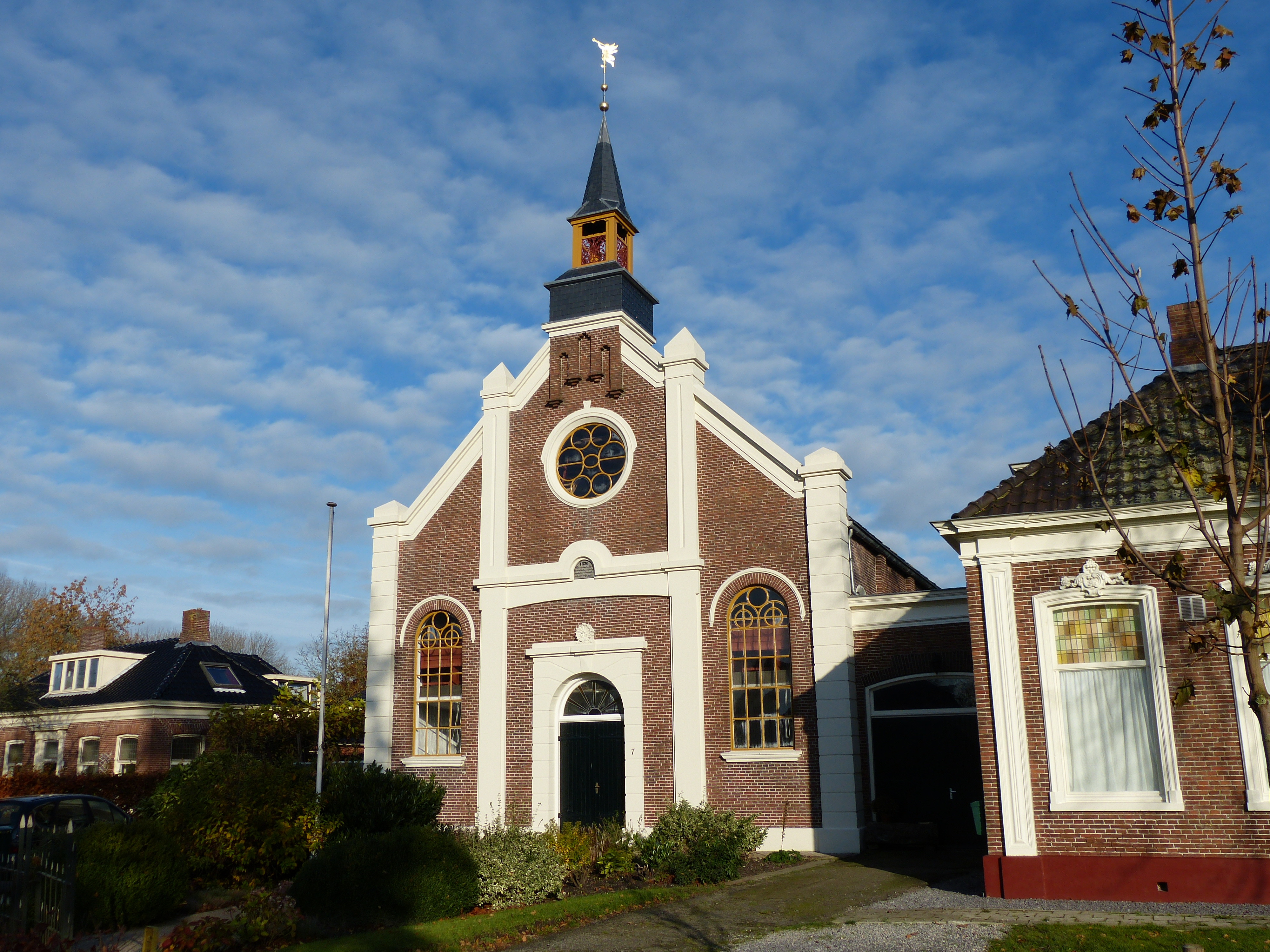 Thesinge kerk Kerkstraat 7